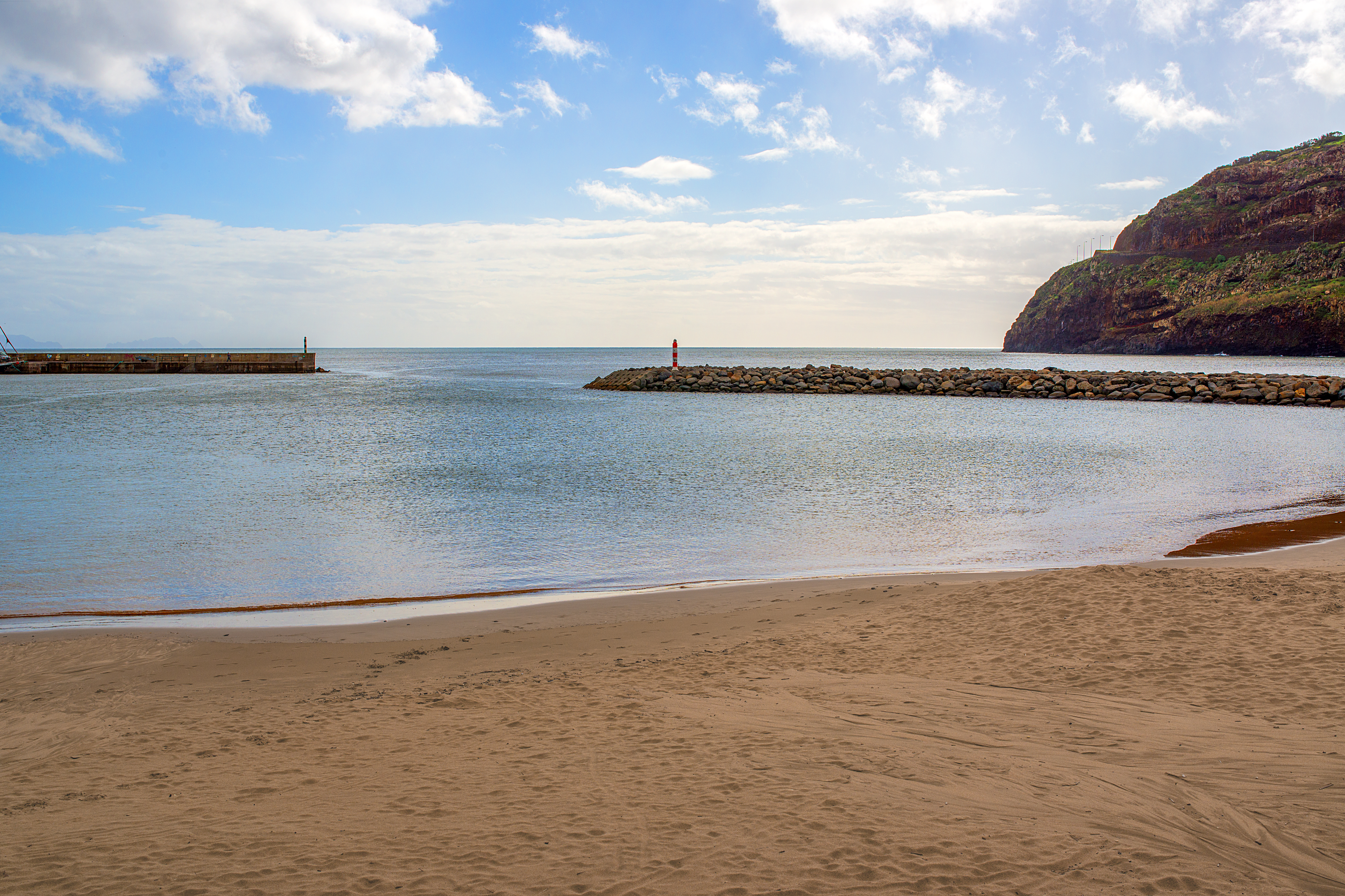 Machico Madeira Portugal January 2014